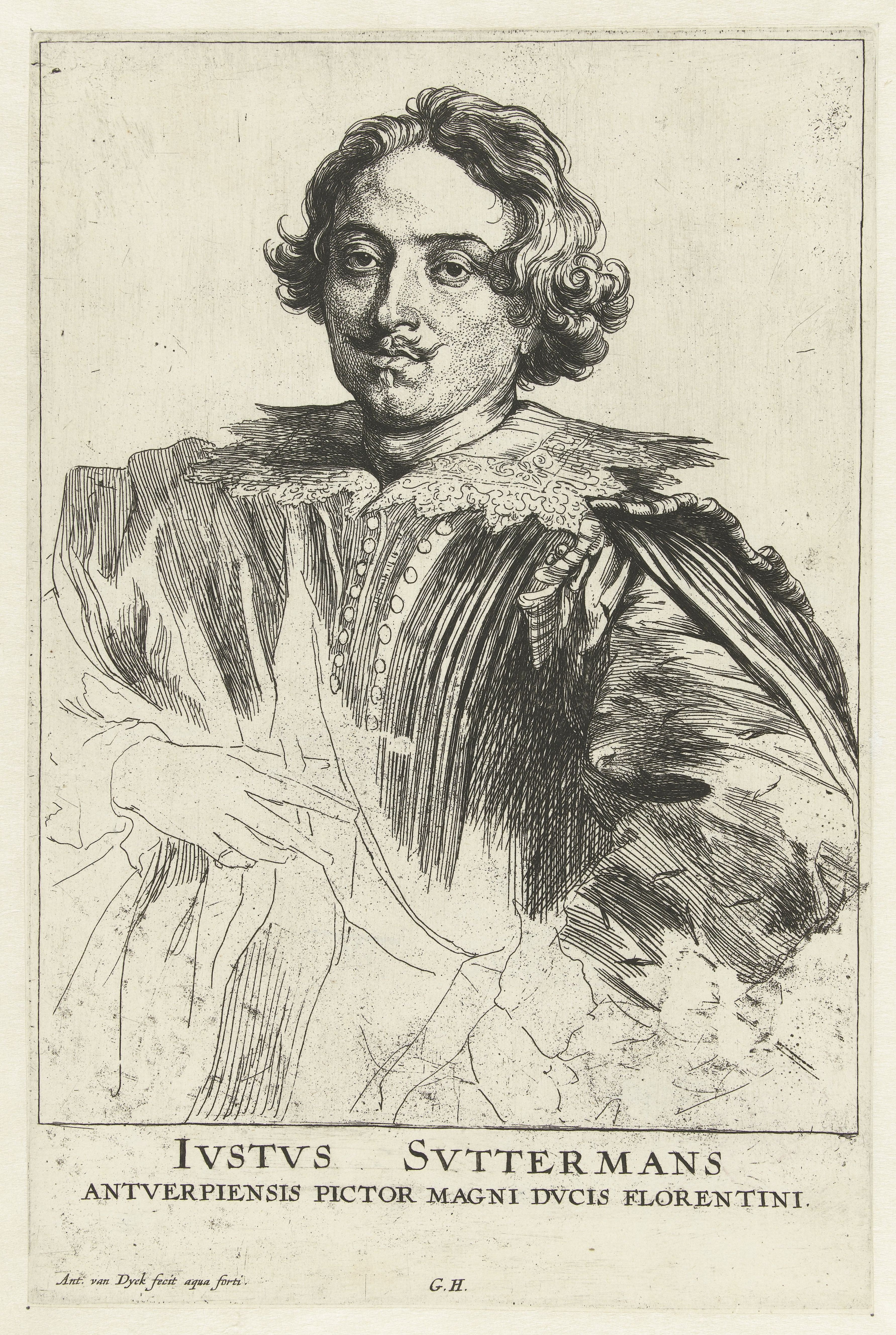 IdentificatieTitel(s): Portret van Justus SustermansIconographie (serietitel)Objecttype: prent Objectnummer: RP-P-BI-7412Catalogusreferentie: New Hollstein Dutch 11-4(5)Mauquoy-Hendricx (van Dyck) 12-4(5)Opschriften / Merken: verzamelaarsmerk, verso linksonder, gestempeld: Lugt 240Omschrijving: Portret van Justus Sustermans met onderschrift IVSTVS SVTTERMANS ANTVERPIENSIS PICTOR MAGNI DVCIS FLORENTINIVervaardigingVervaardiger: prentmaker: Anthony van Dyck (vermeld op object)prentmaker: anoniemnaar tekening van: Anthony van Dyckuitgever: Gilles Hendricx (vermeld op object)Plaats vervaardiging: NederlandenDatering: 1630 - 1632 en/of 1645 - 1646Fysieke kenmerken: ets en gravureMateriaal: papier Techniek: etsen / graveren (drukprocedé)Afmetingen: blad: h 252 mm × b 167 mmOnderwerpWat: portrait, self-portrait of painterWie: Justus SustermansVerwerving en rechtenVerwerving: overdracht van beheer 1816Copyright: Publiek domein